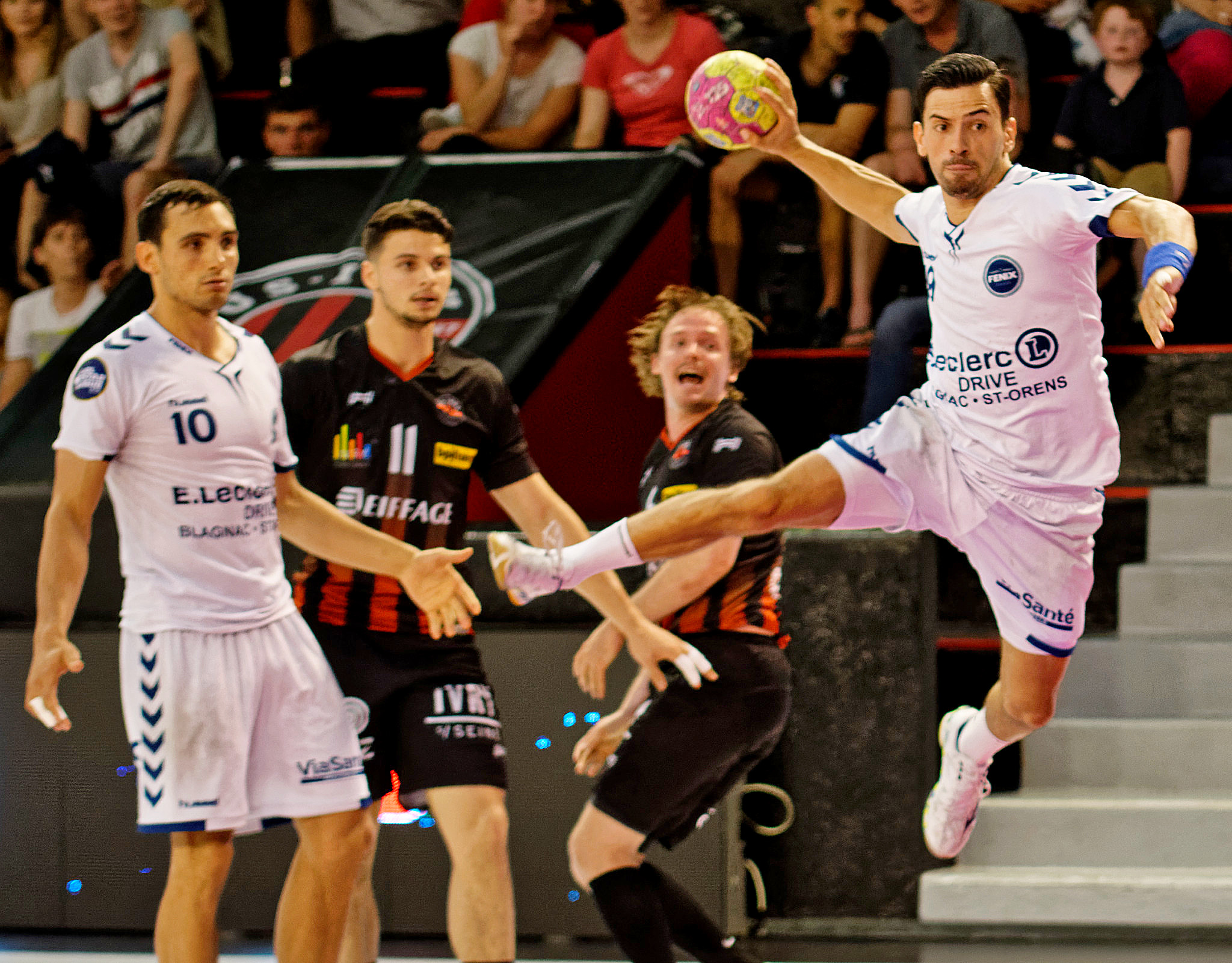 Rencontre de championnat de LidlStarLigue entre l'US Ivry et Toulouse. A Ivry, le 31 mai 2017.